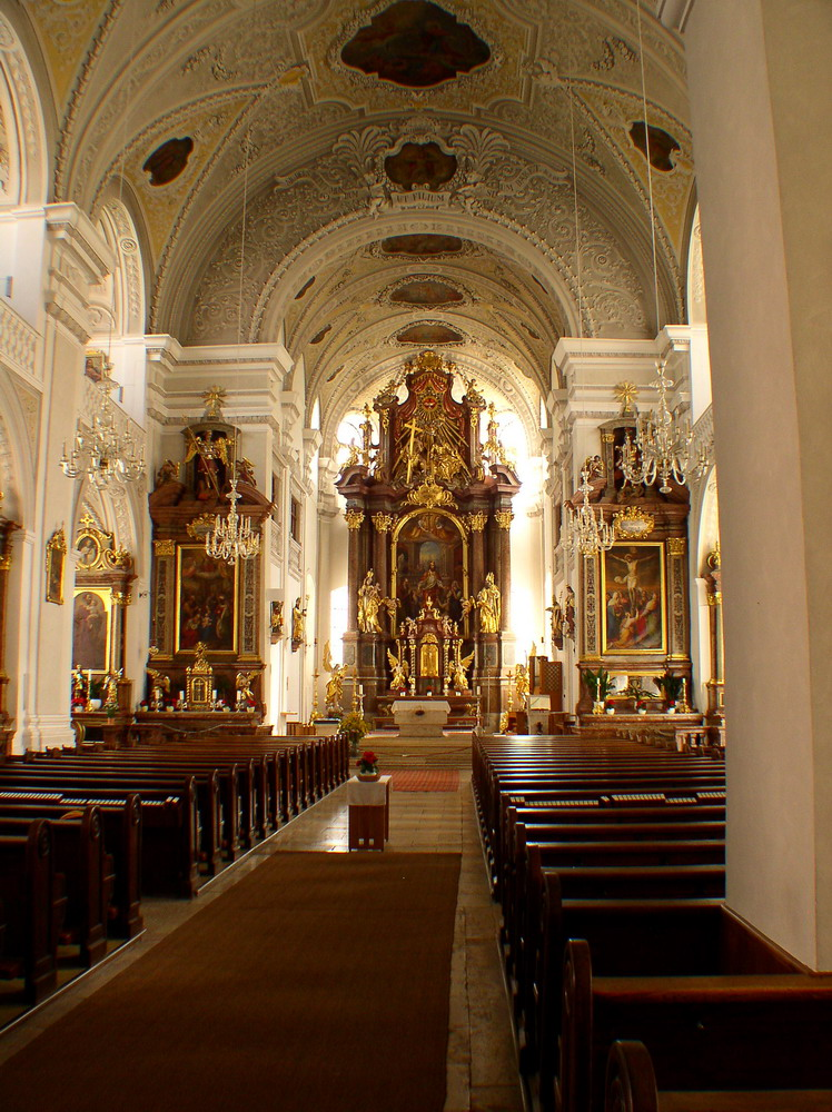 Innenraum Pfarrkirche St. Oswald in Traunstein 1